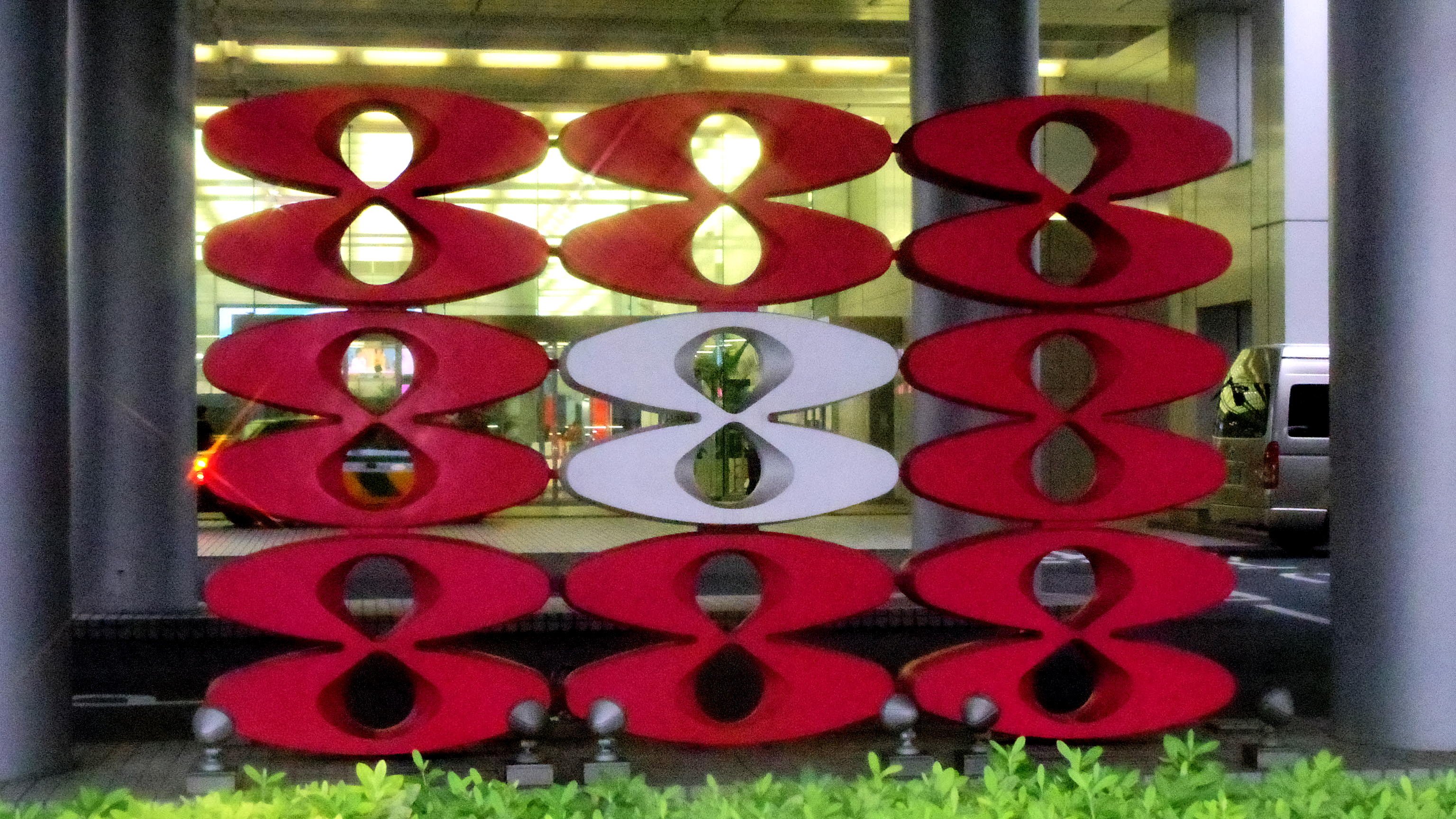 フジテレビ本社屋「FCGビル」1階入口に設置されている、フジテレビのチャンネルマーク「8」（旧ロゴマーク、亀倉雄策作）をかたどったモニュメント。なお、この8マークは1959年の開局から1986年のCI導入まで使用された。